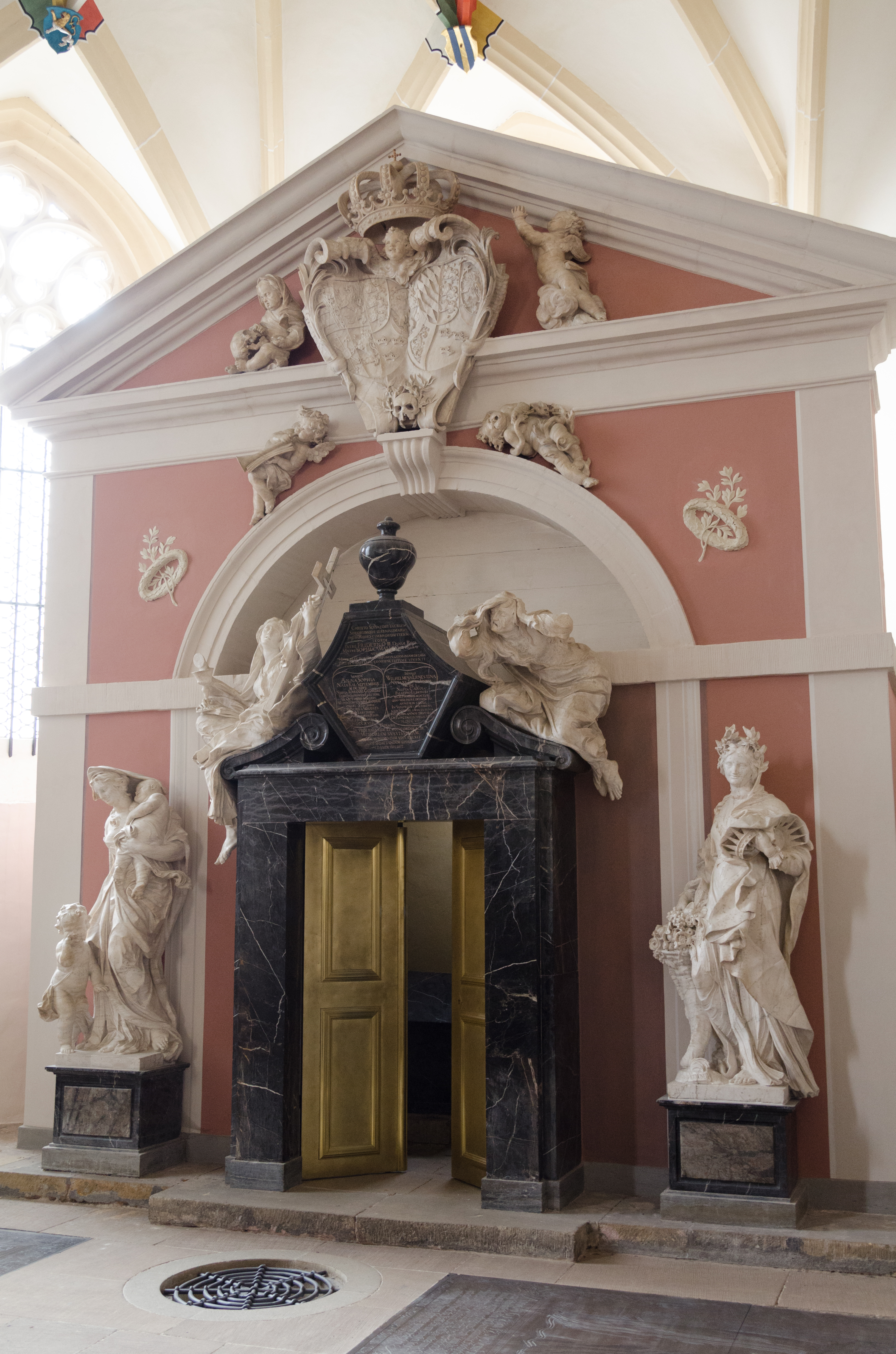 Freiberger Dom